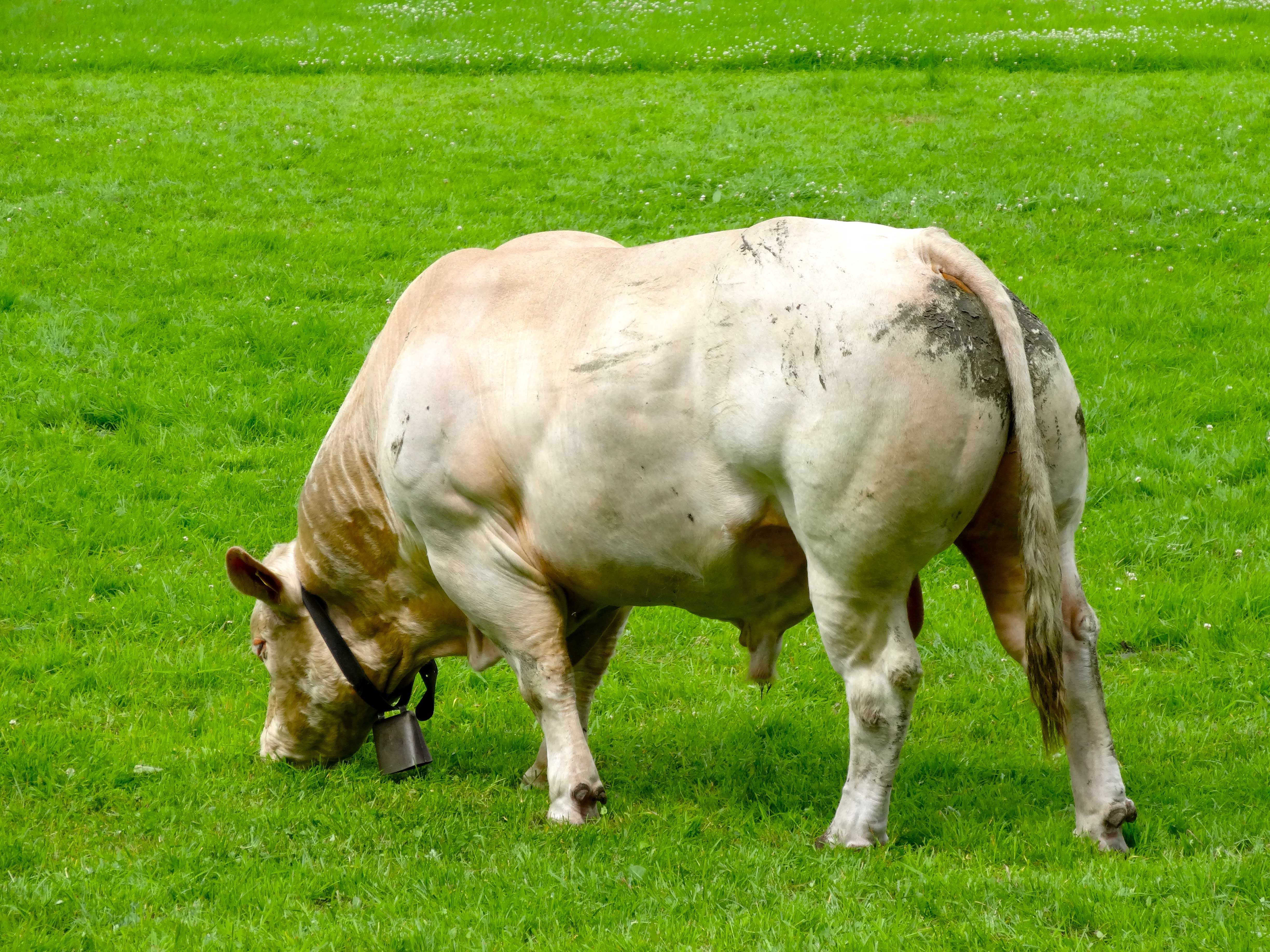 Blonde d'Aquitaine (stier)